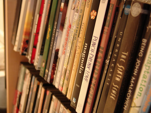 DVDs - édition vidéo